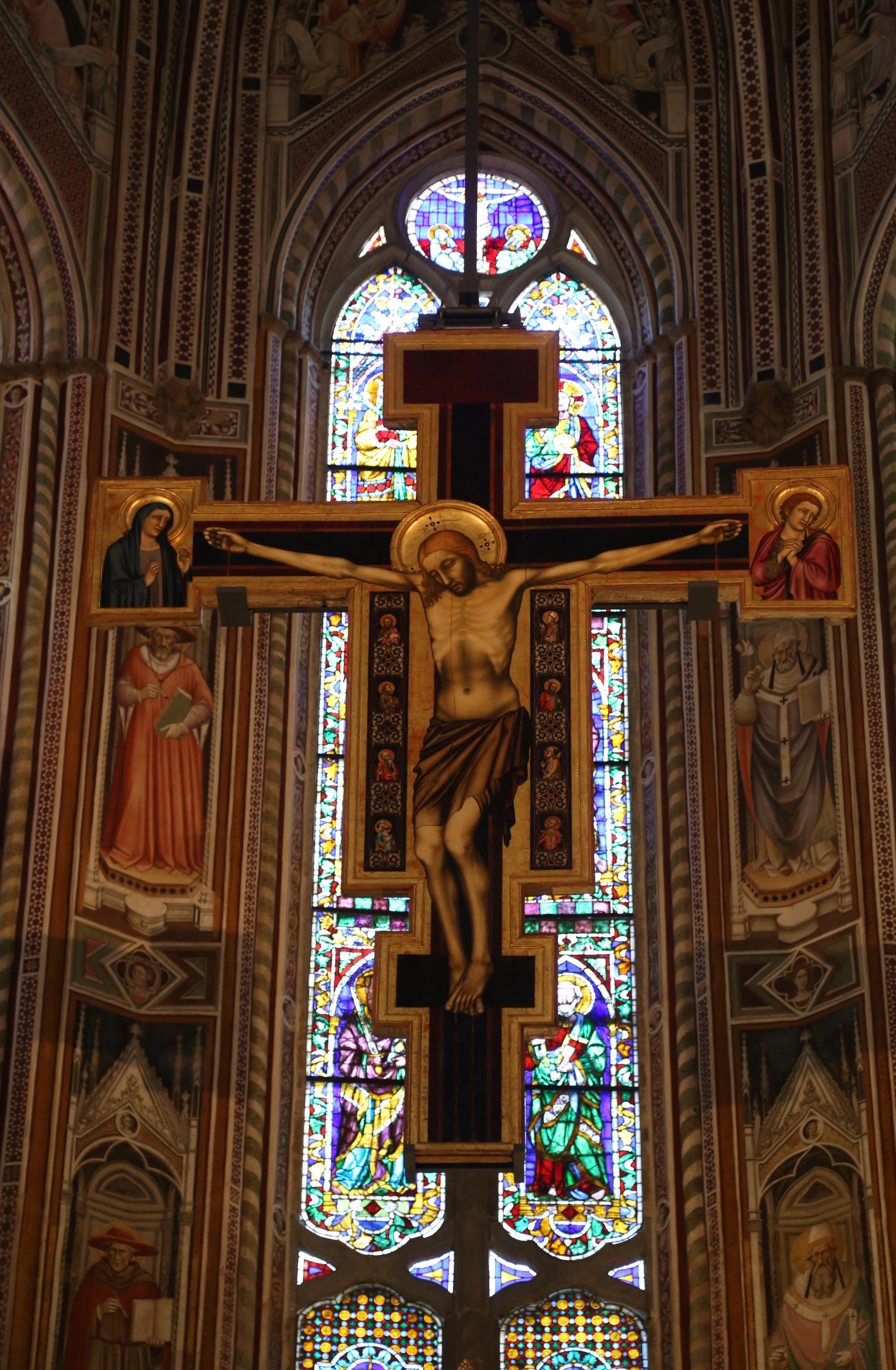 Maestro di Figline: Kreuz über dem Hauptaltar, Santa Croce, Florenz